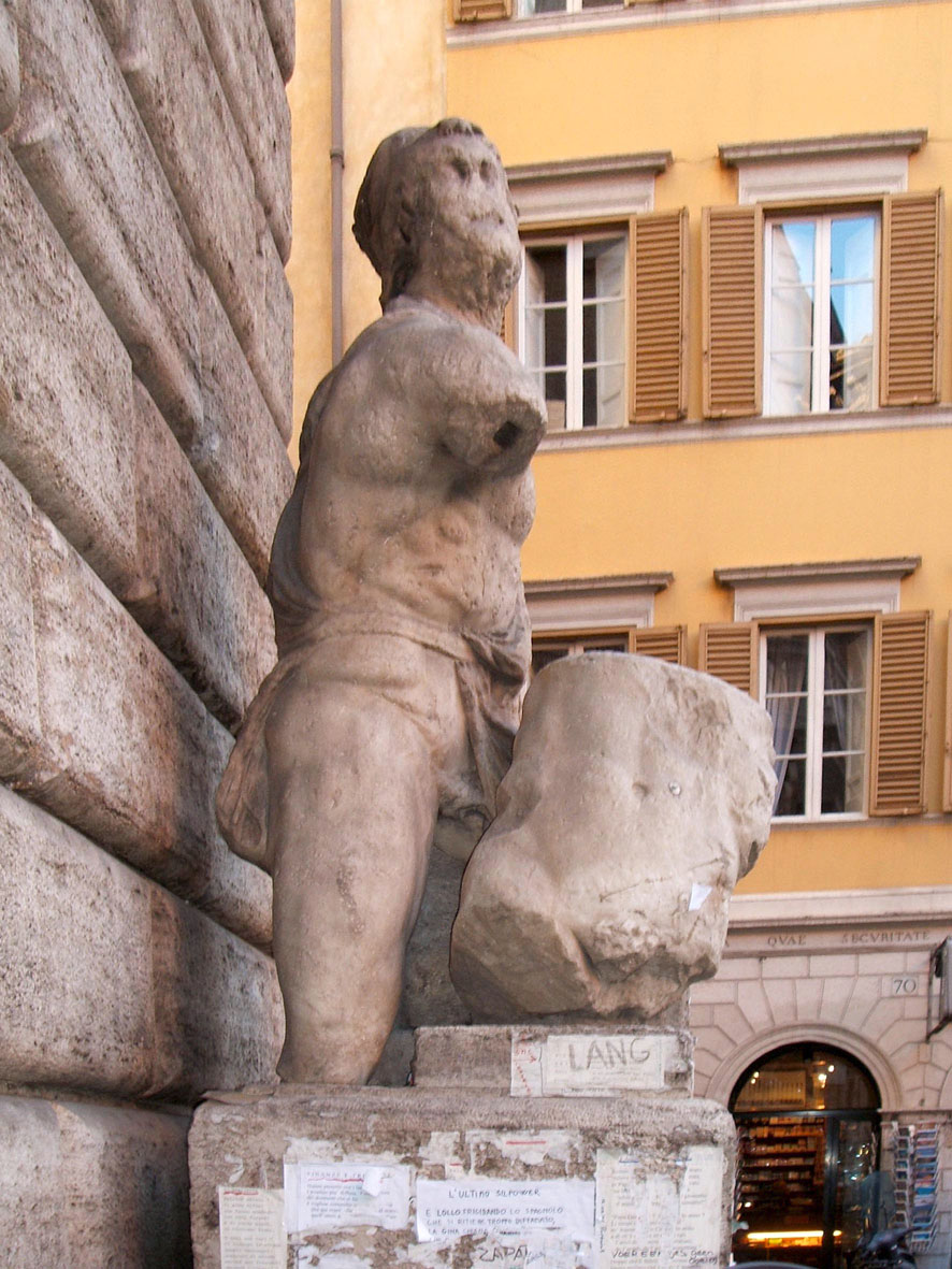 Pasquino, statua parlante a Roma, pza. Pasquino, vicino Piazza Navona.